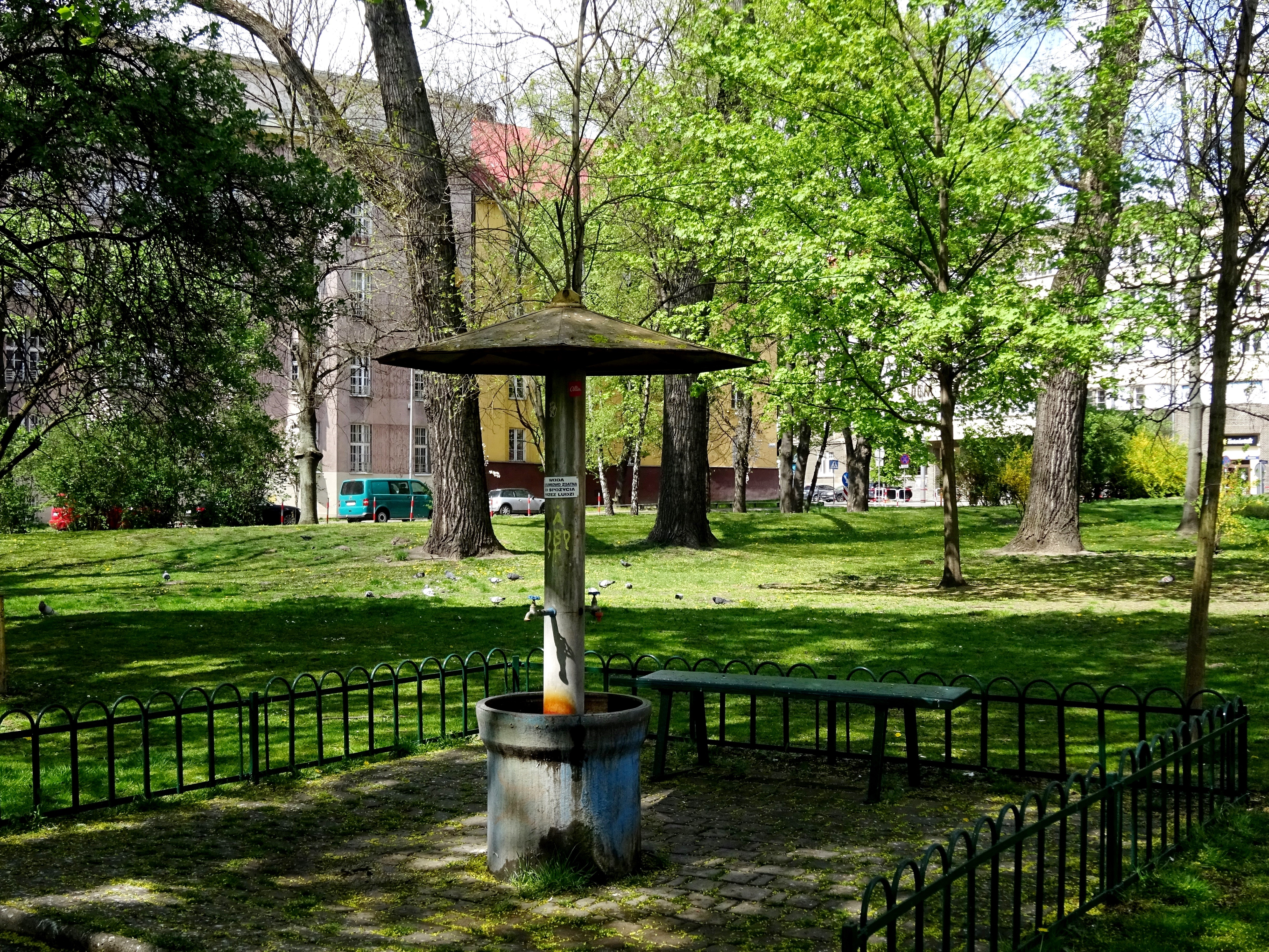 Zdrój Królewski, artezyjska studnia głębinowa w Krakowie na Placu Inwalidów w sąsiedztwie Parku Krakowskiego.